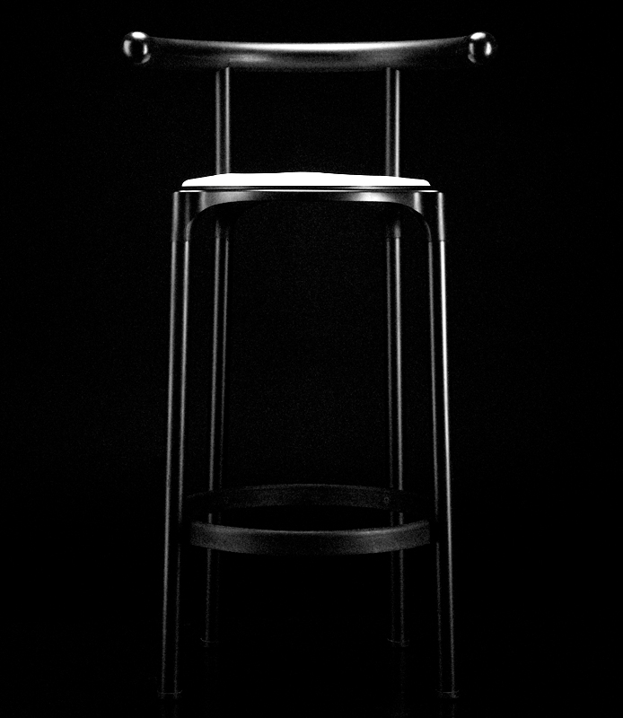 Kartell Anna Castelli Stool